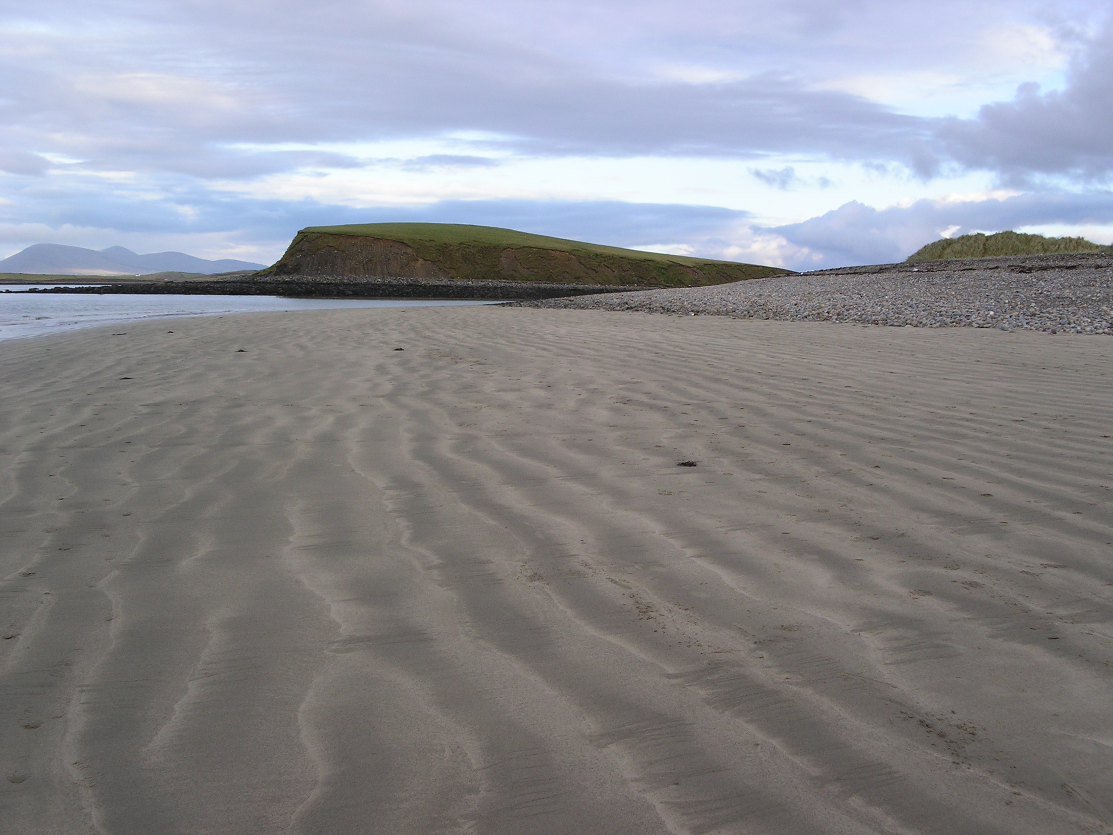 A drowned drumlin in Clew Bay